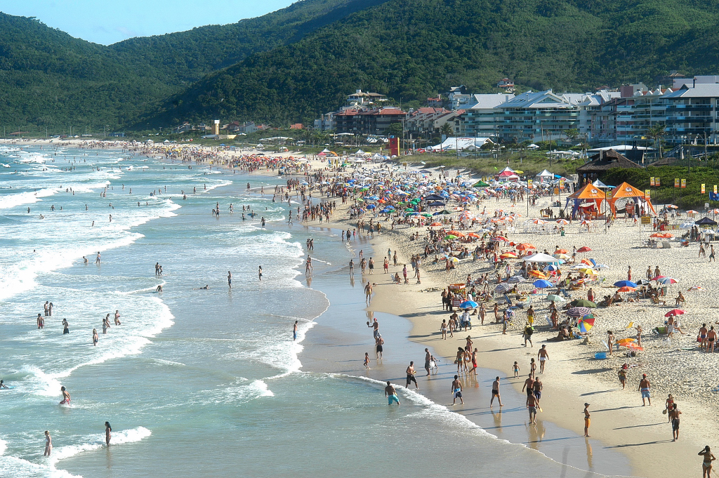 Uma das mais belas praias de Florianópolis